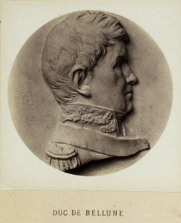 Claude-Victor Perrin, Duc de Bellune, maréchal d'empire, médaillon par David d'Angers publié dans Les médaillons de David d'Angers réunis et publiés par son fils David d'Angers, Robert (1833-1912) en 1867.